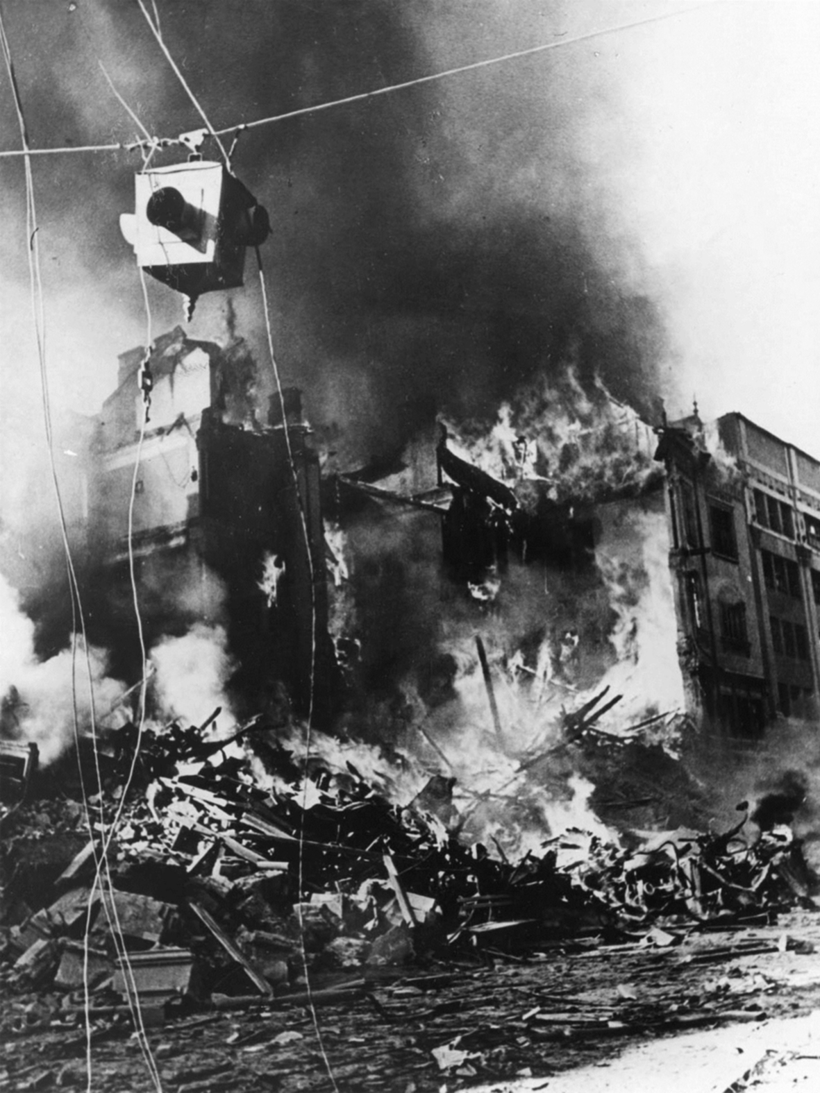 Пожежа на розі Хрещатика і Прорізної. Київ, 24 вересня 1941 року.